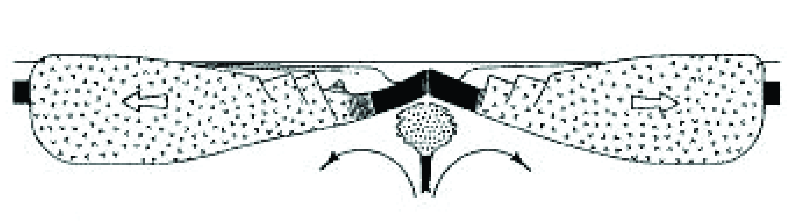 Rift estilo tectonico